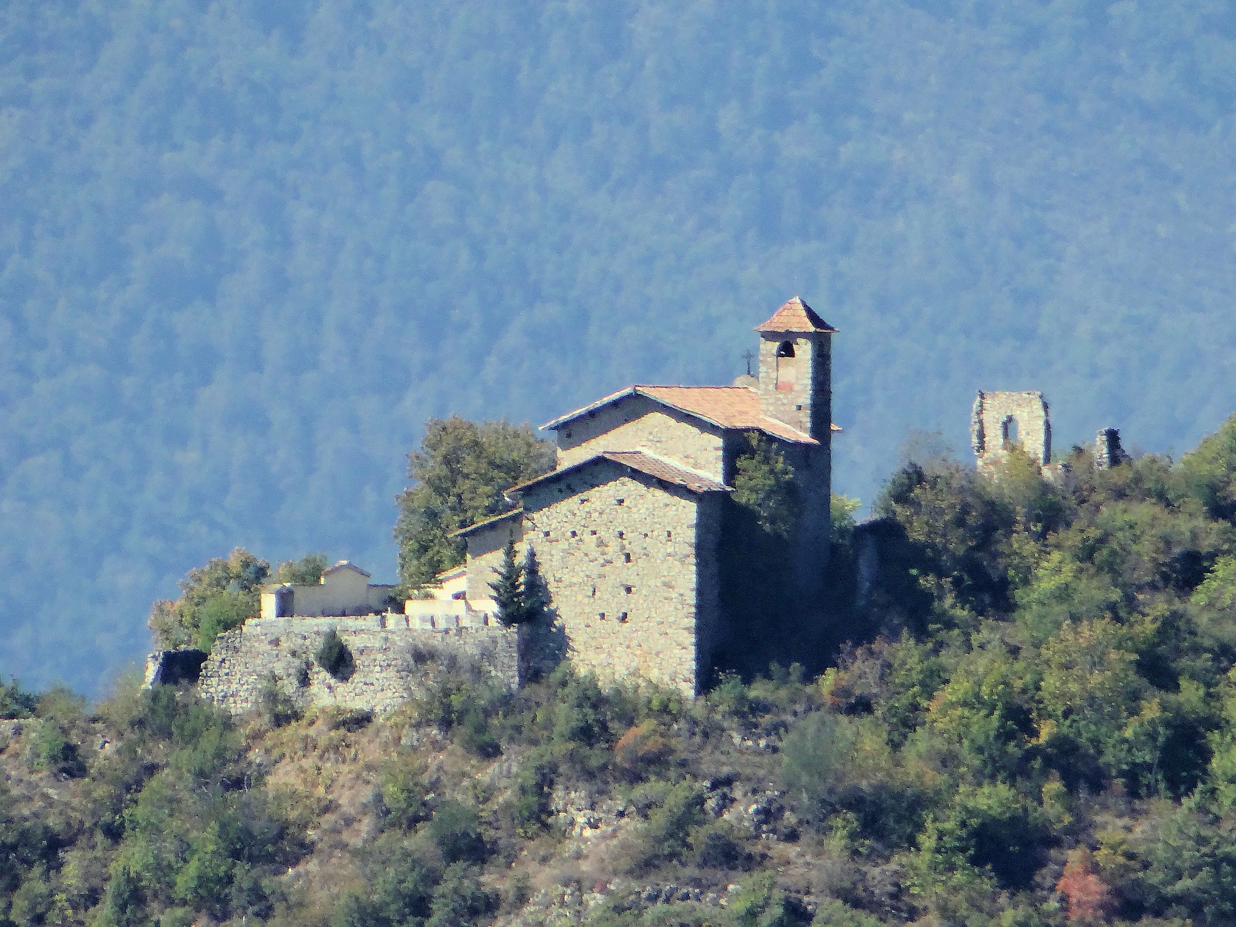 Tournefort (Alpes-Maritimes) - Eglise du vieux village et ruines vues de La Tour